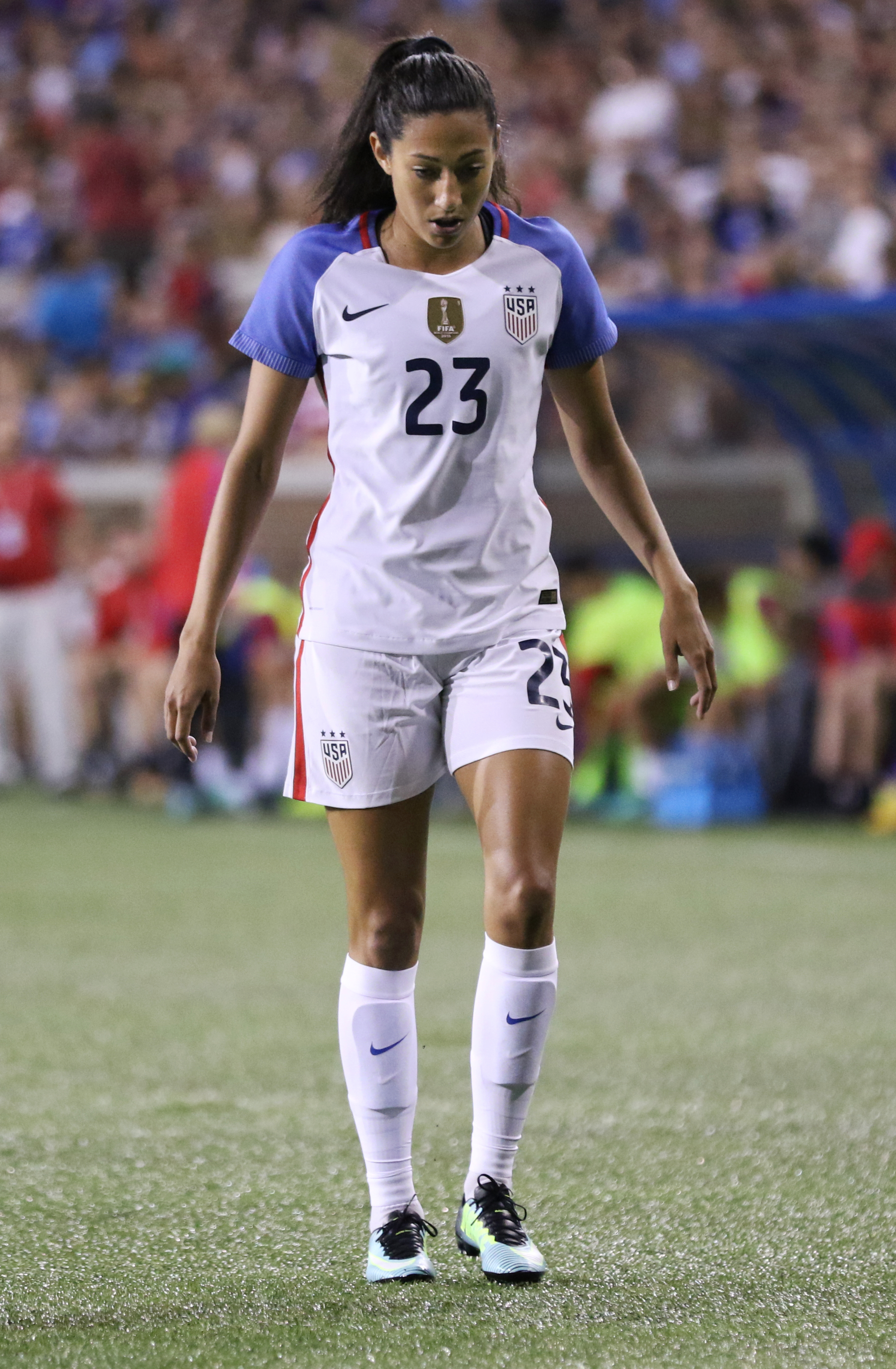 ChristenPress